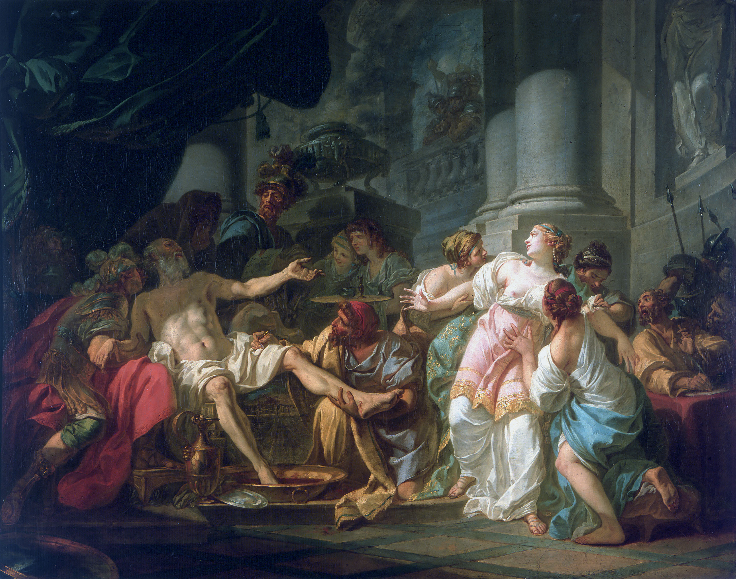 La morte di Seneca, olio su tela, Musée du Petit-Palais, Parigi